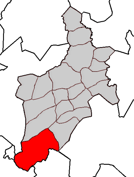 Situación da parroquia de Vizoño no concello de Abegondo